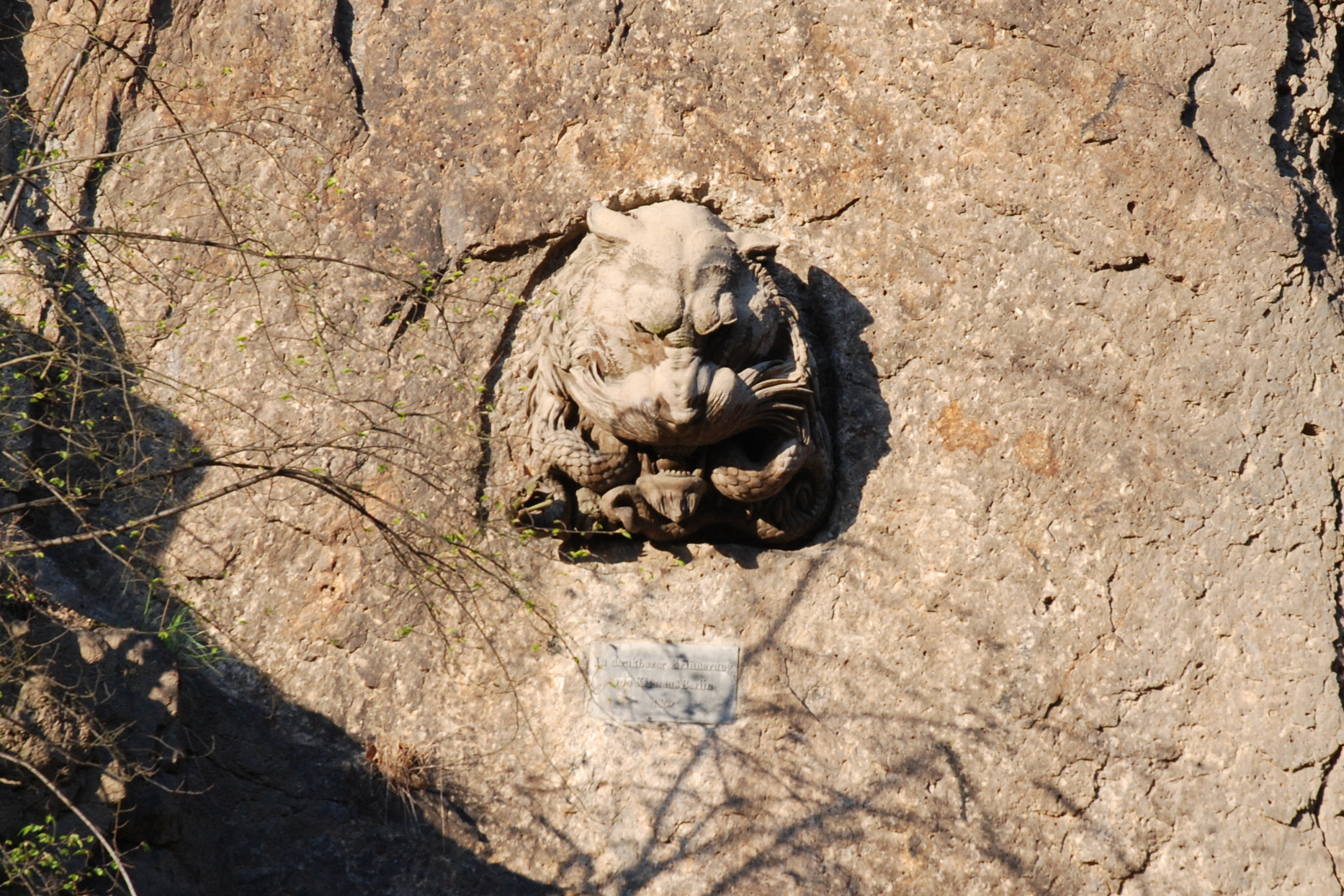 Litinová reliéfní plastika hlavy lvice nad Slovenskou ulicí v Karlových Varech